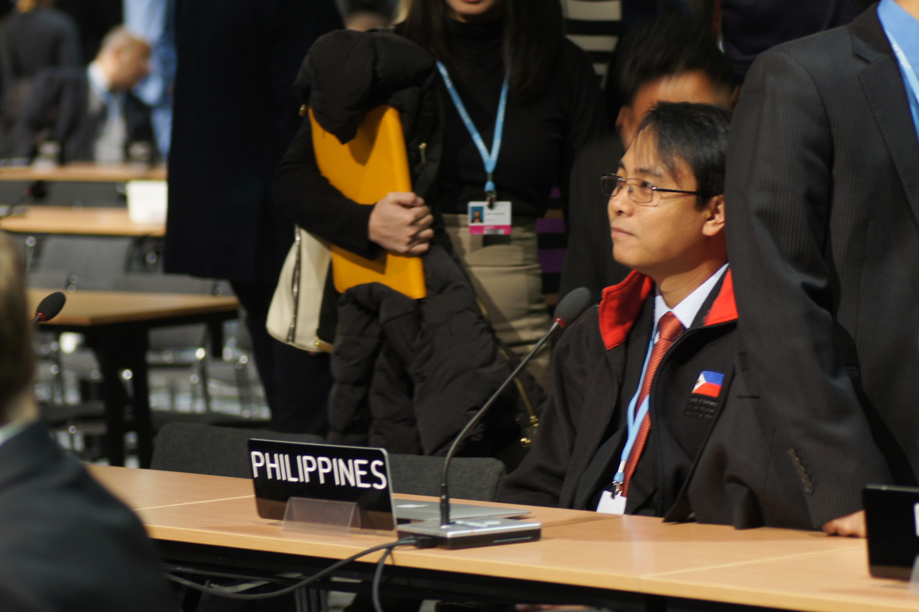 COP19 at National Stadium